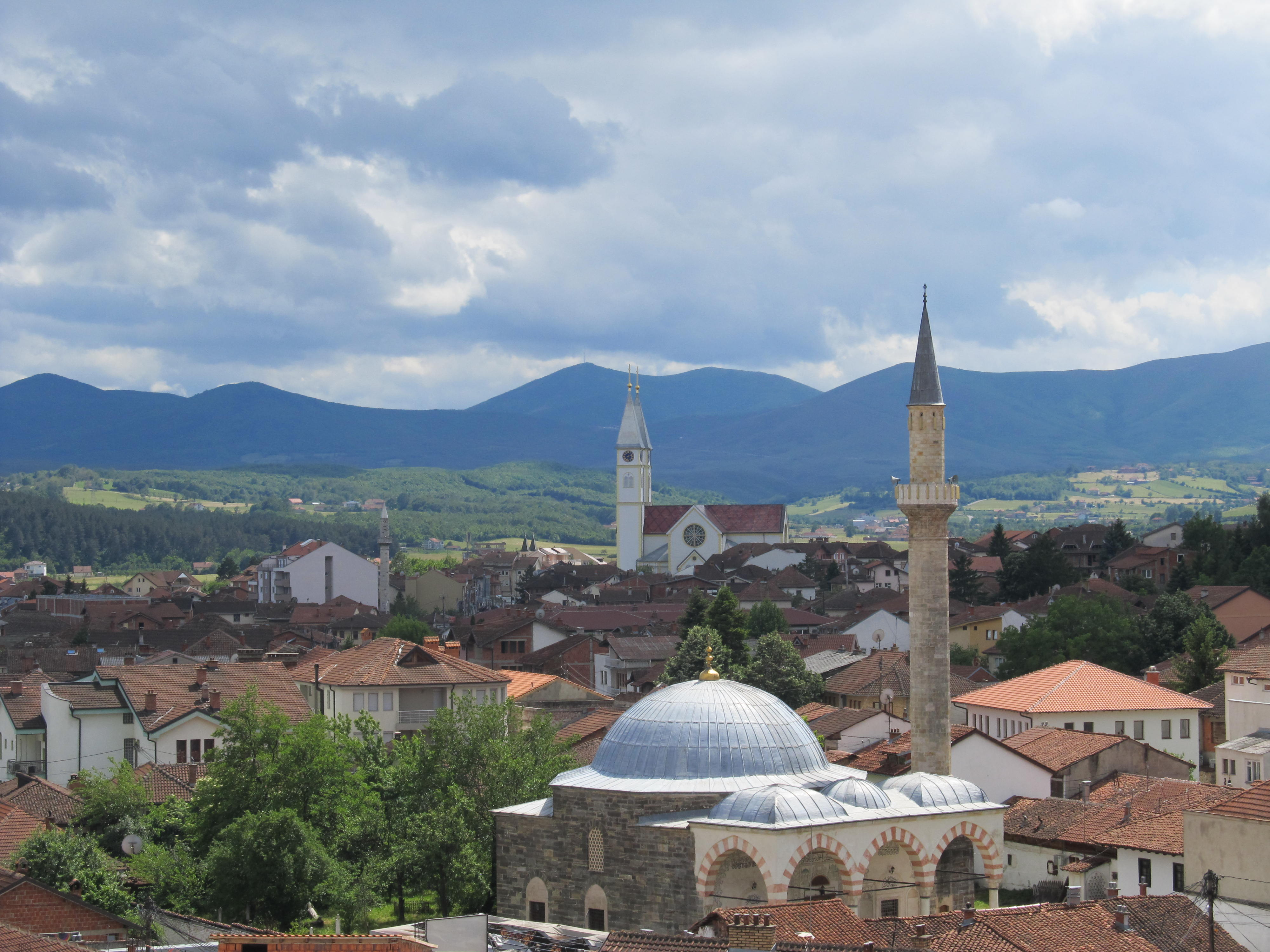 Pamje e e Kishes katolike dhe e Xhamis..